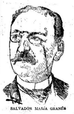 Salvador Maria Granes